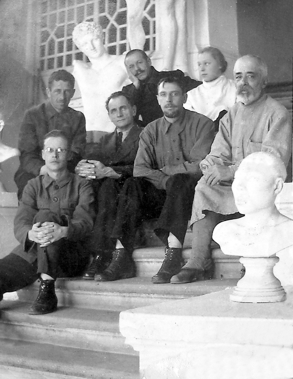 Директор Хабаровского краевого музея Владимир Клавдиевич Арсеньев с сотрудниками музея. Хабаровск, декабрь 1925 г.Нижний ряд: Андрей Иванович Кардаков, заведующий зоологическим отделом (в очках, фотографировал он). Средний ряд: Семён Яковлевич Сизых, учёный секретарь; Владимир Клавдиевич Арсеньев, директор музея; Александр Николаевич Толпегин, заведующий библиотекой; Георгий Евграфович Сольский, таксидермист-препаратор. Верхний ряд: Николай Николаевич Лебединский, заведующий канцелярией; Нина Алексеевна Богданова (Серк, Толпегина), заведующий отделом этнографии